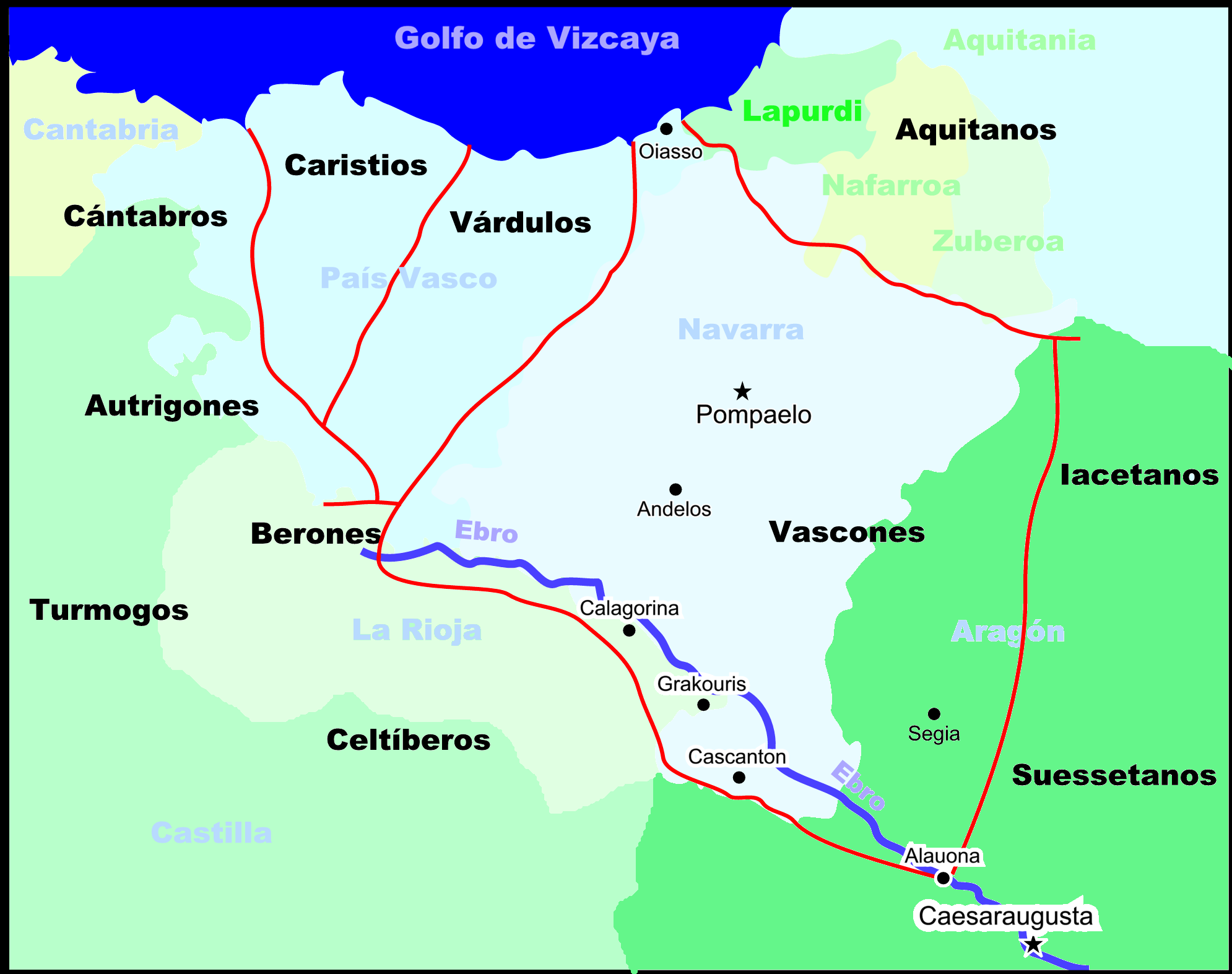 Mapa del norte de Hispania